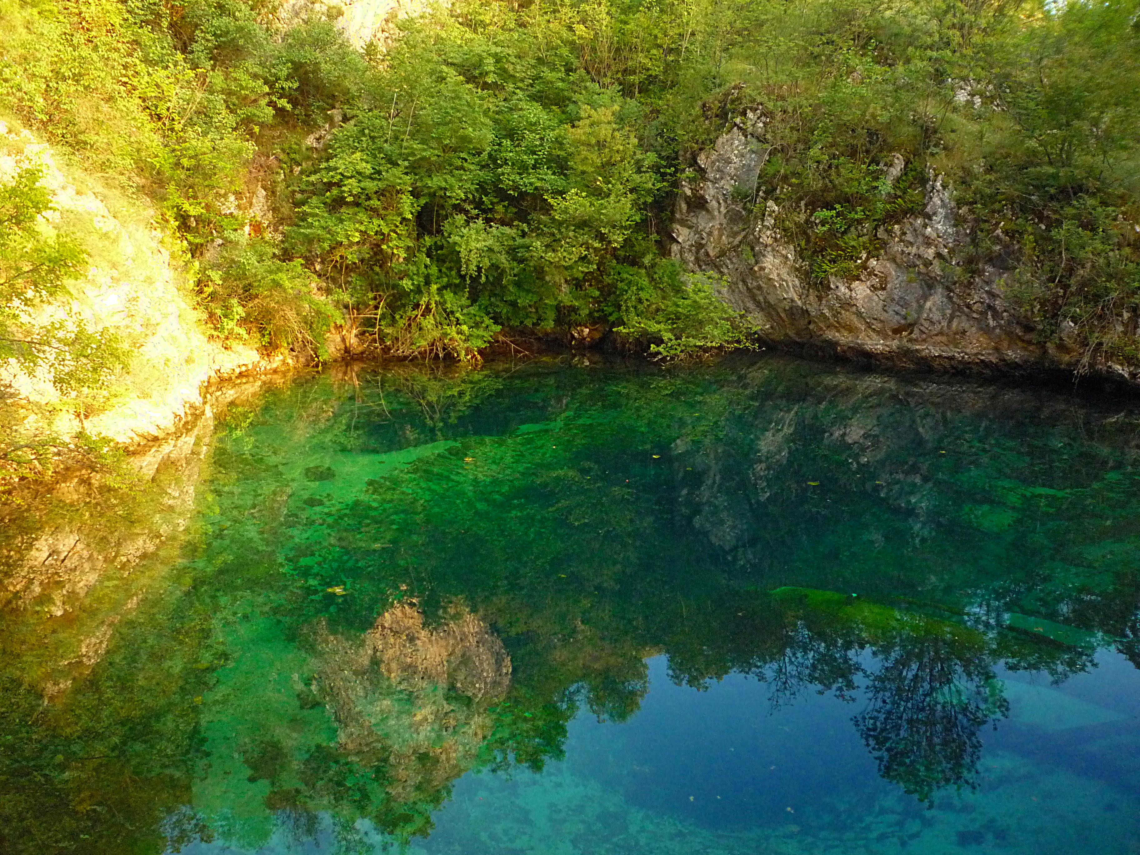 Српски (ћирилица): Ово је фотографија заштићеног природног добра у Србији под шифром: СП239 This is a a photo of a natural area in Serbia with ID: СП239 Споменик природе Крупачко врело, општина Бела Паланка